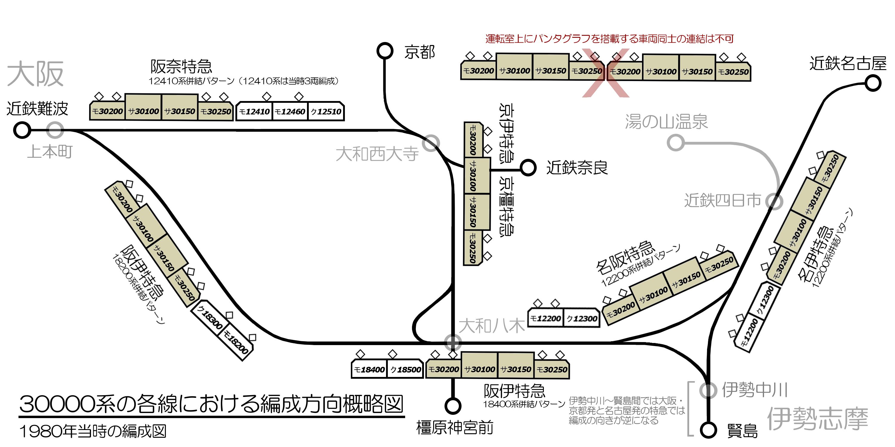 各線における編成の向きを簡潔に表す図